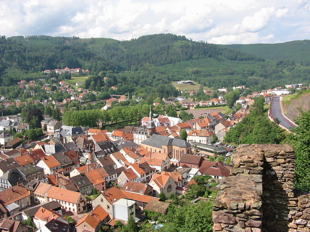 Schirmeck Commune de Schirmeck (Bas-Rhin) Vue plongeante depuis le château À droite, la déviation quelques mois avant sa mise en service Photographie personnelle, prise le 29 juin 2006 Copyright © Christian Amet